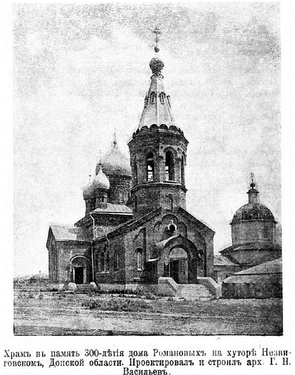 Церковь Успения Пресвятой Богородицы в Недвиговке